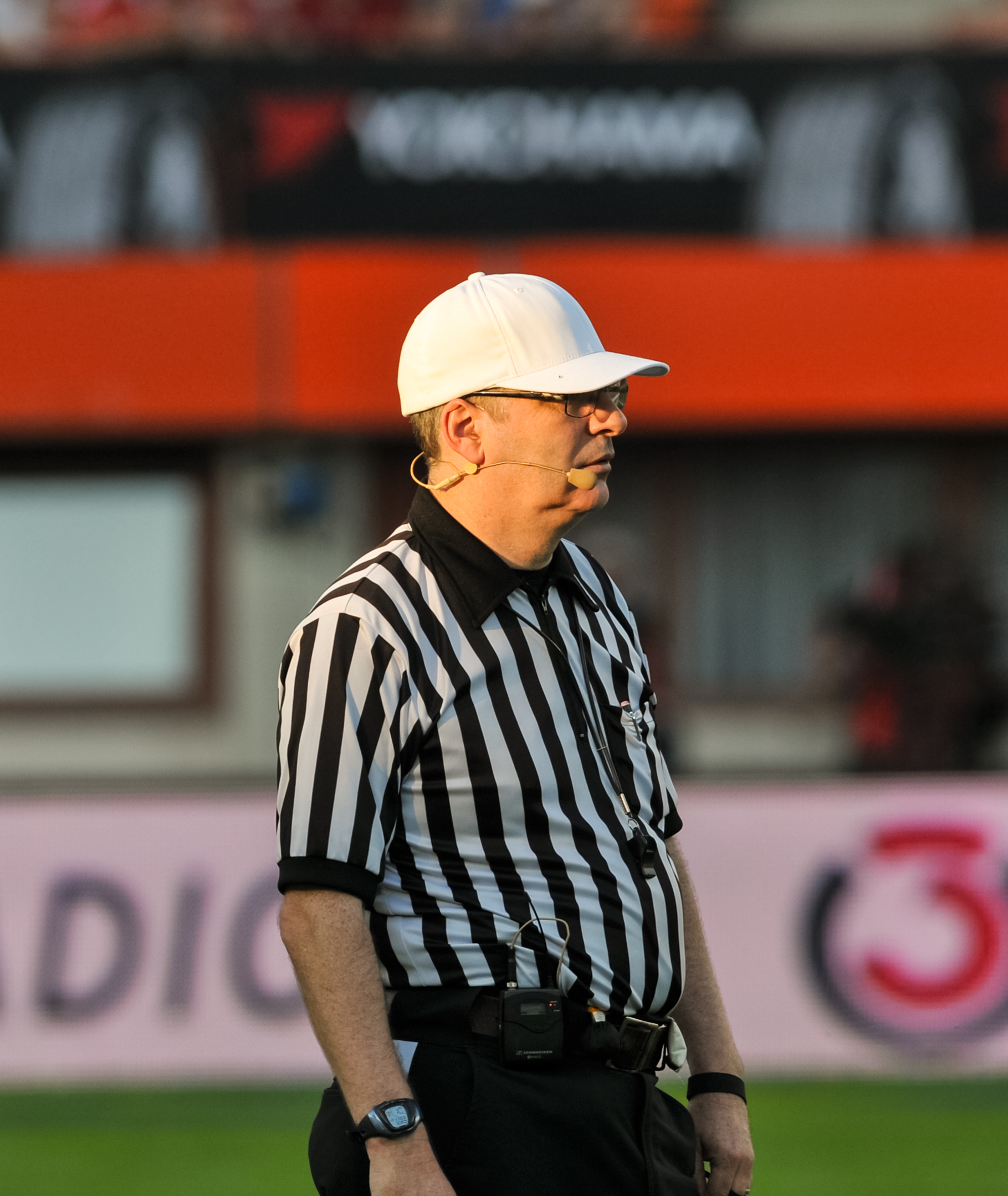 Keith Wickham, Referee beim Finalspiel der Football-EM 2014 zwischen Österreich und Deutschland.